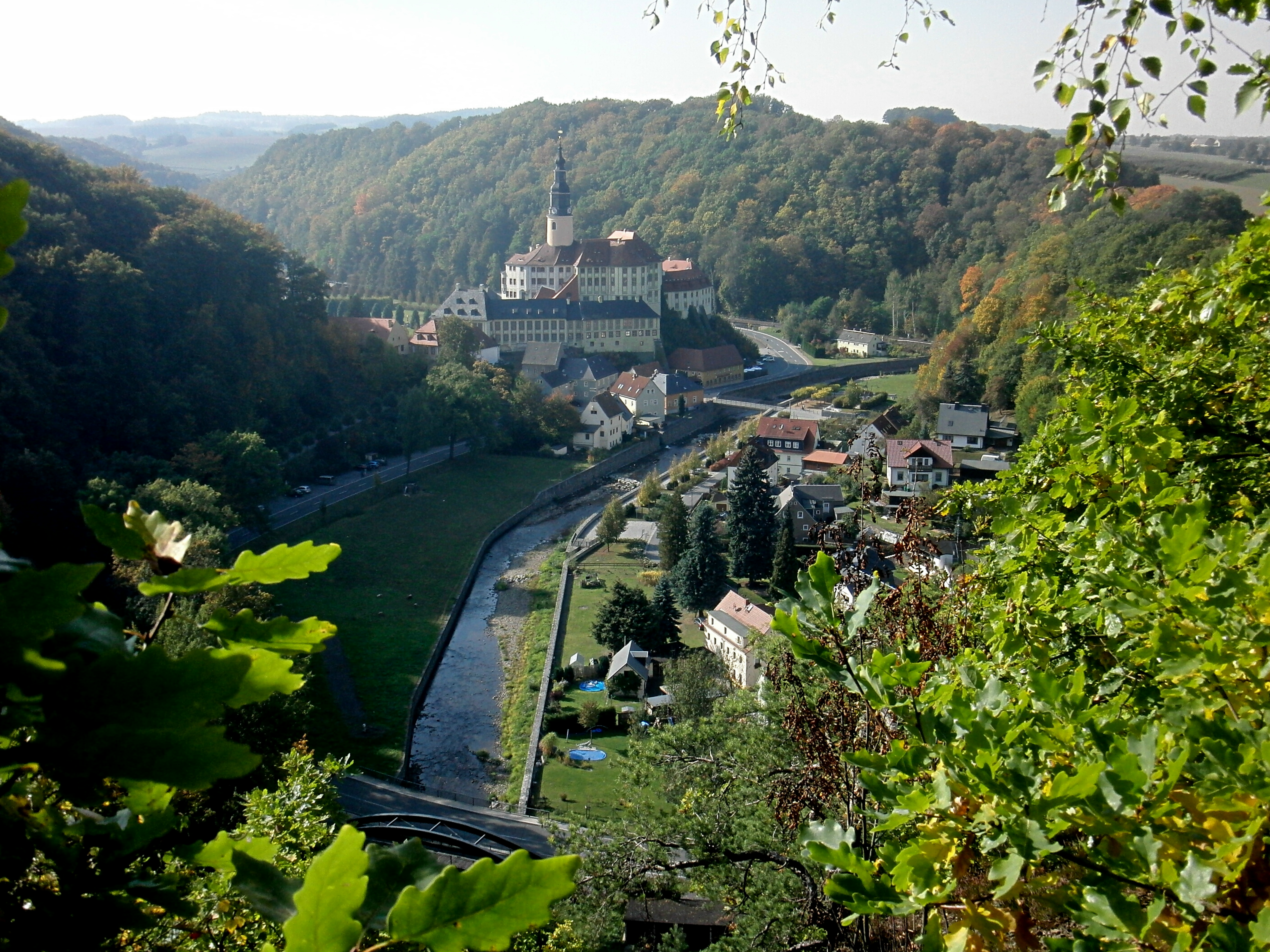 Blick vom Standort des 1951 abgerissenen Belvedere zum Schloss Weesenstein